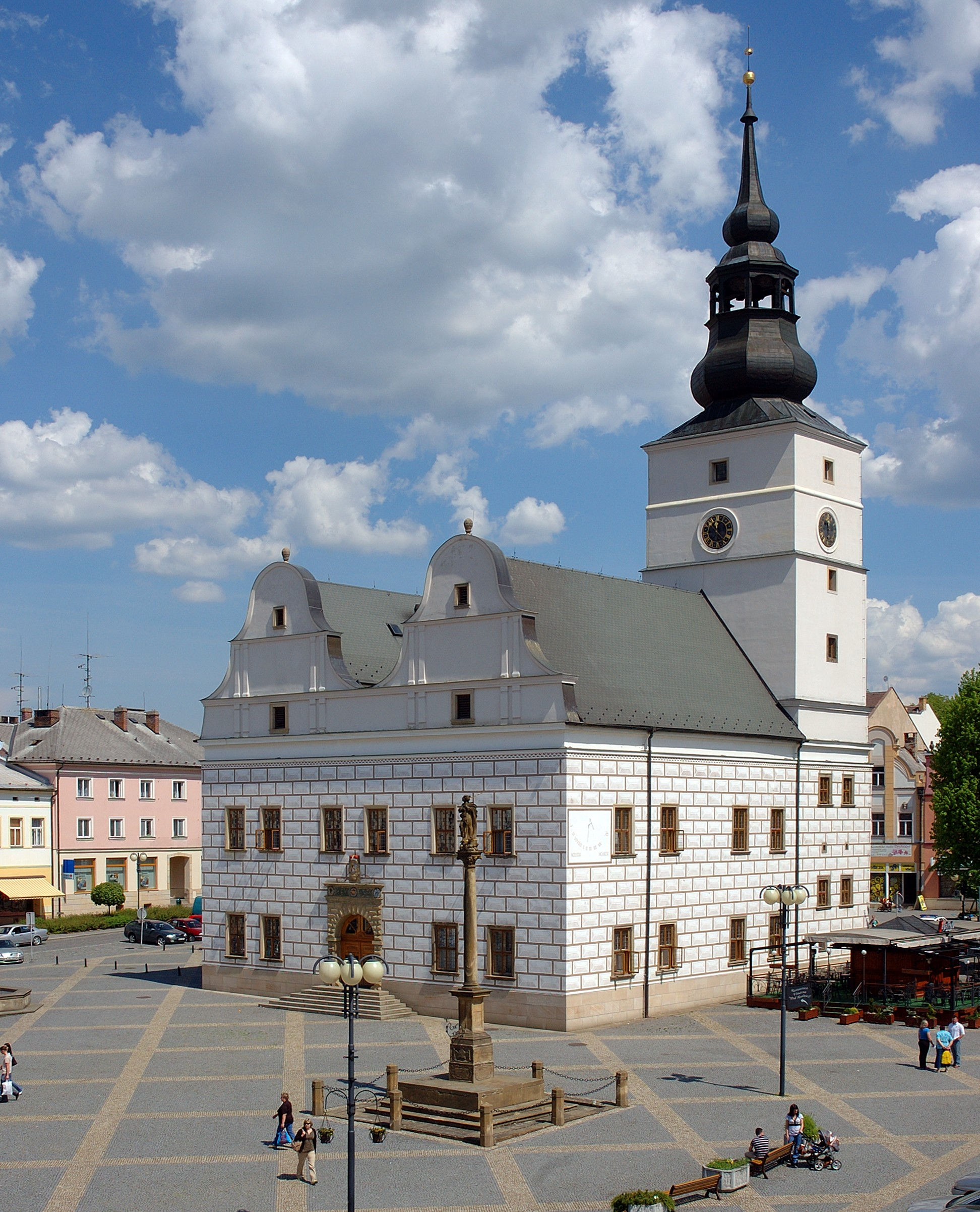 Renesační radnice na náměstí J. M. Marků v Lanškrouně.